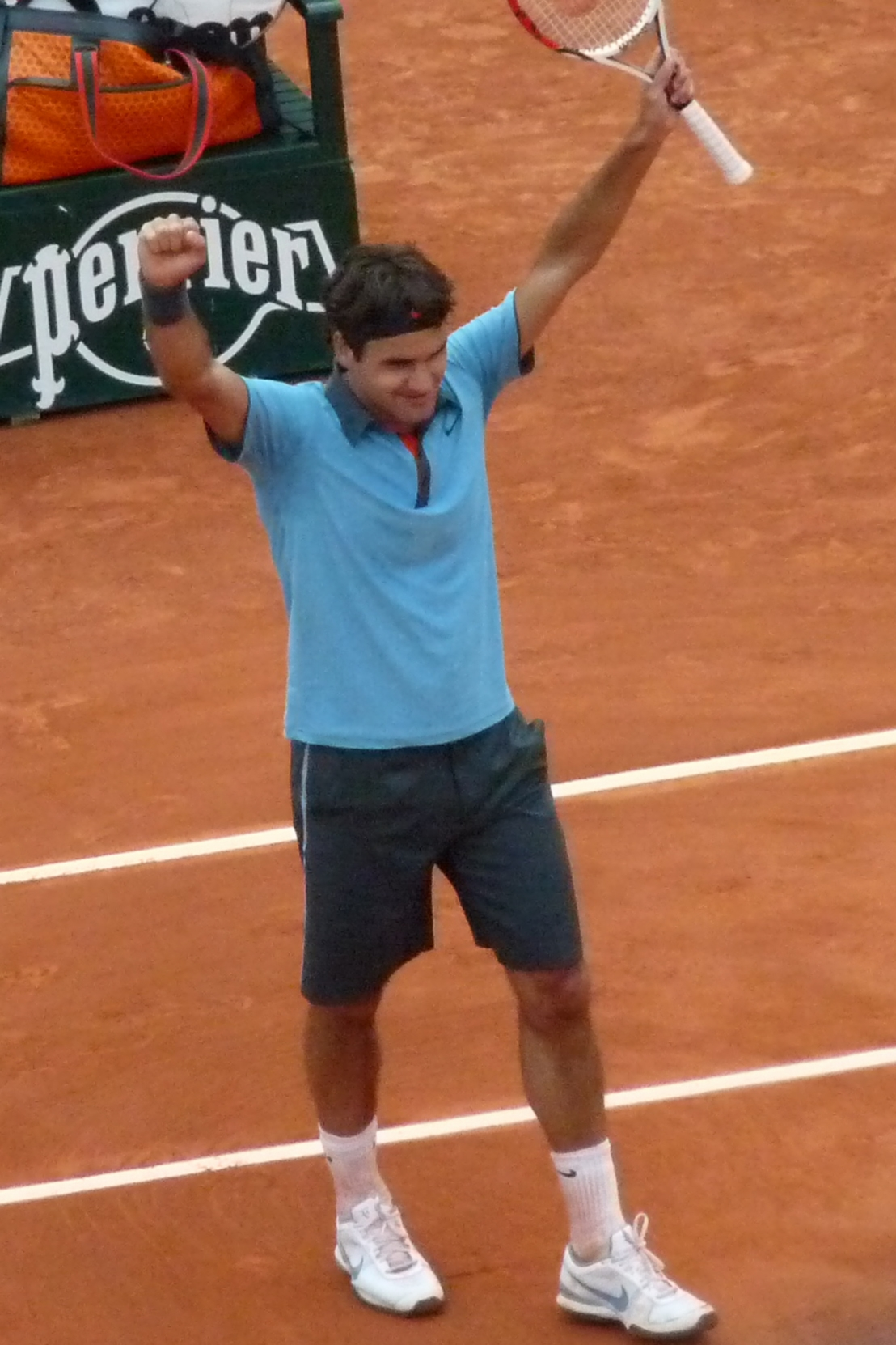 Roger Federer against Juan Martín del Potro in the 2009 French Open semifinals